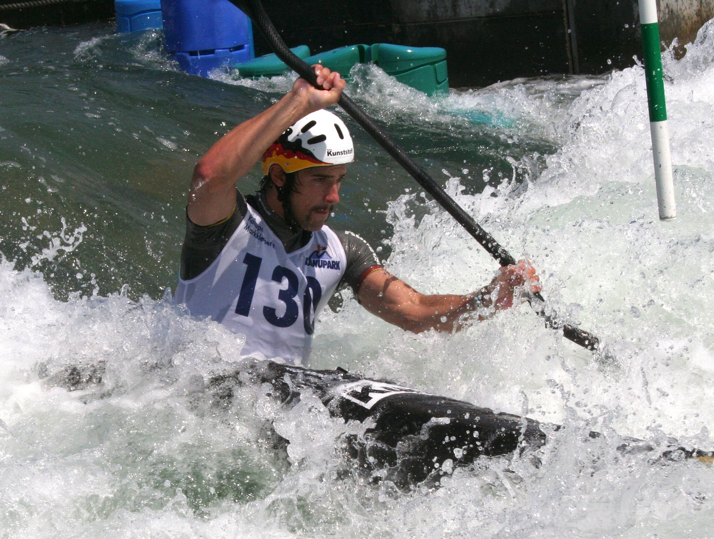 Deutscher Slalomkanuten und Olympiateilnehmer in London 2012